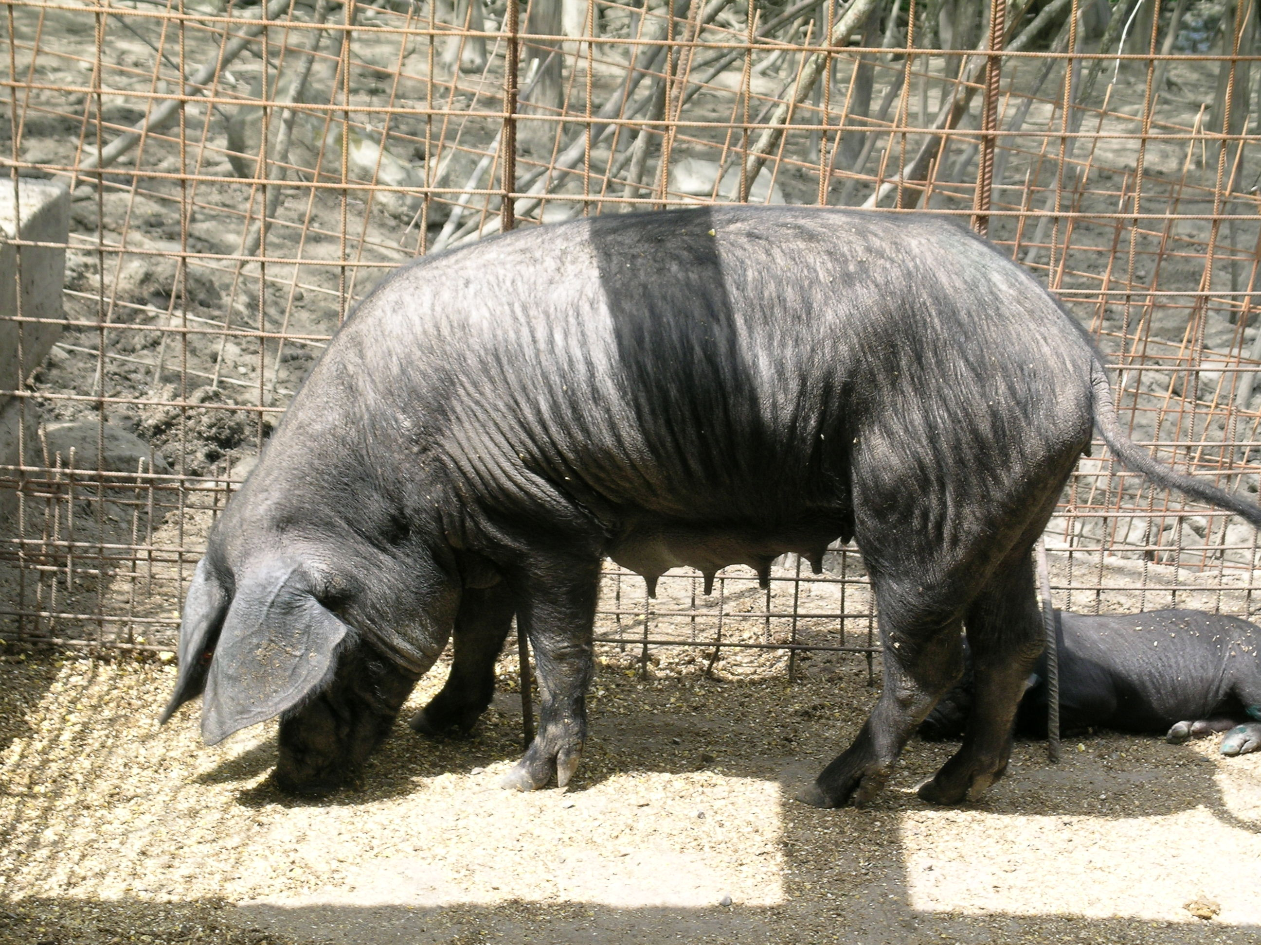 autore:scalibor fonte: foto personale fatta durante una visita all'agriturismo "Cà del fuoco" che alleva il suino Nero di Parma allo stato brado descrizione: Suino Nero Di Parma